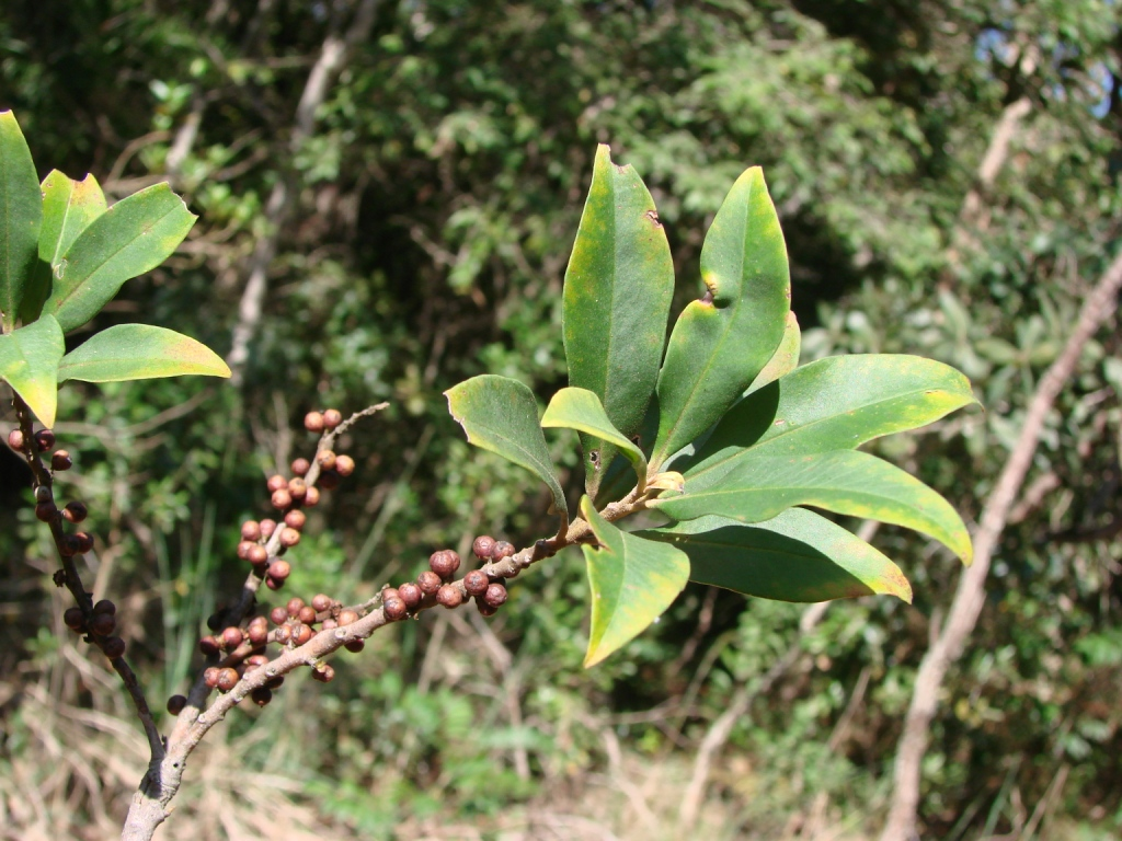 Myrsine coriacea (Sw.) R.Br. ex Roem. & Schult. (Sin het. Rapanea ferruginea (Ruiz & Pav.) Mez) - PRIMULACEAE (sin. MYRSINACEAE) - Jardim Botânico de Brasília - Brasília - Distrito Federal - Brasil.